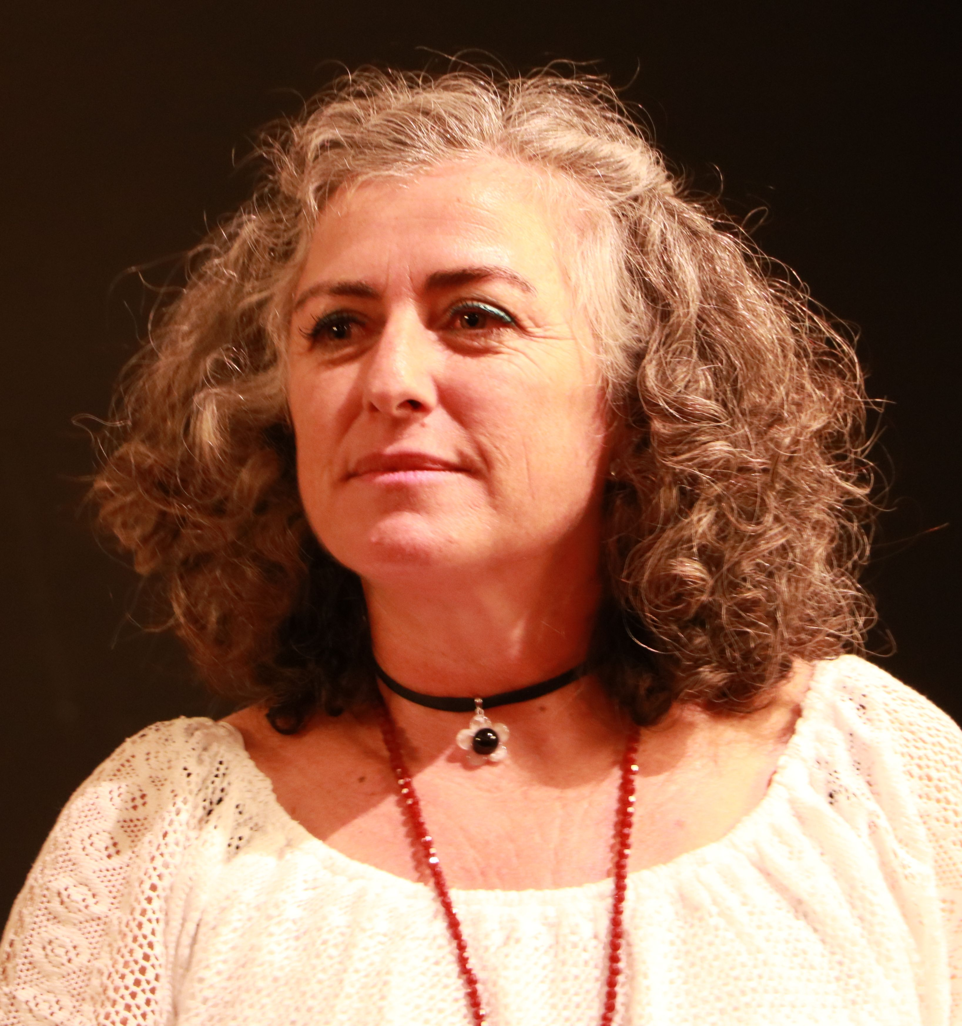 Lidia Peralta , Journalist and documentary filmmaker. Known for La Caravana del manuscrito andalusí